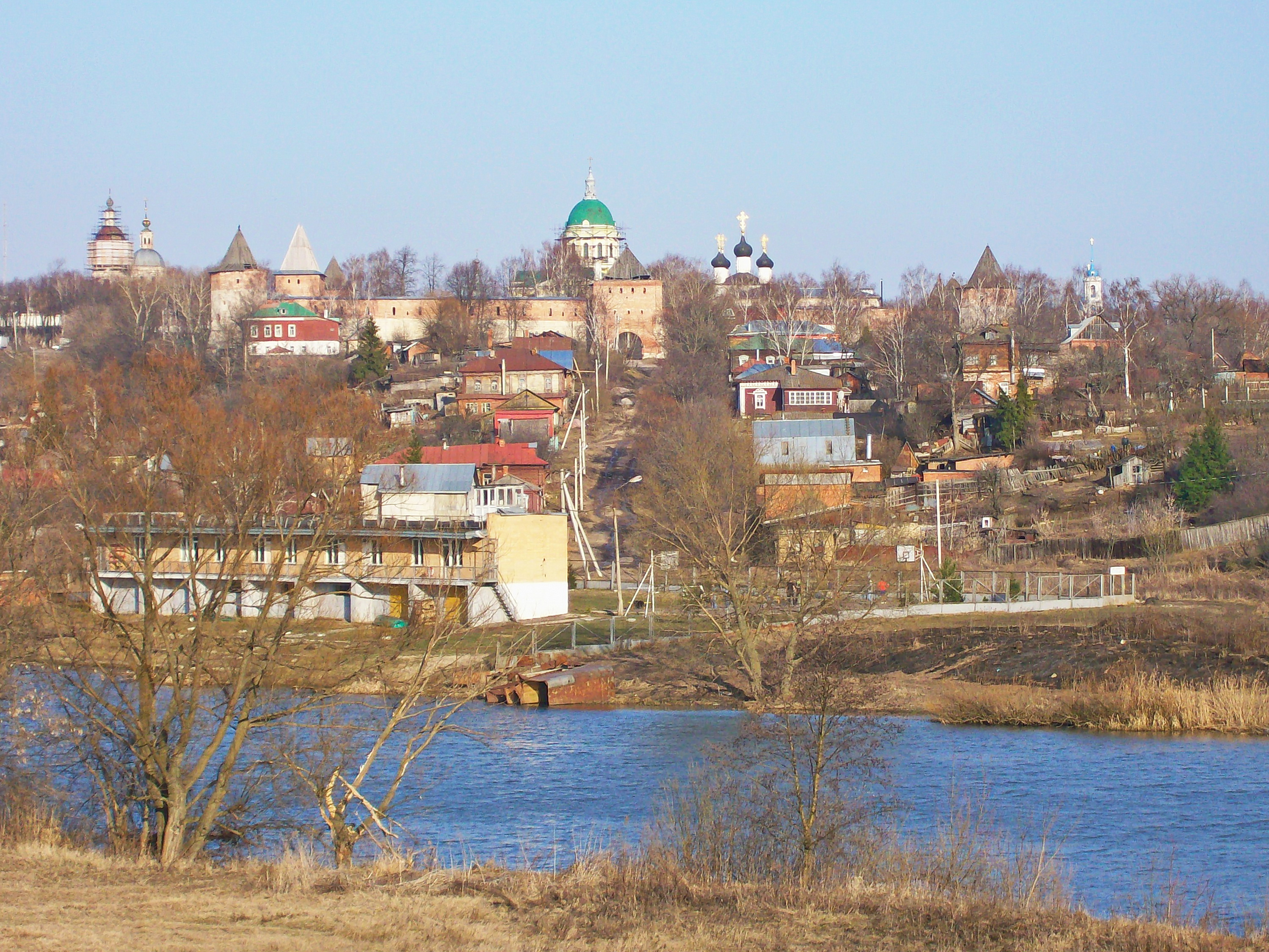 Зарайский Кремль (Москва и Московская область, Зарайск, Музейная улица)